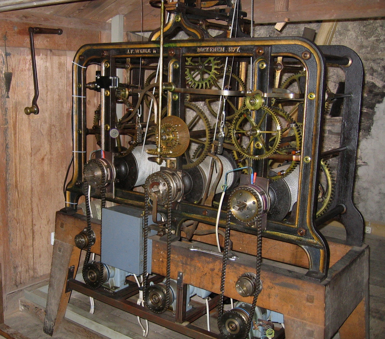 Turmuhrwerk (1877) der Firma J. F. Weule aus Bockenem in der Erlöserkirche (Lüdenscheid) in Lüdenscheid.